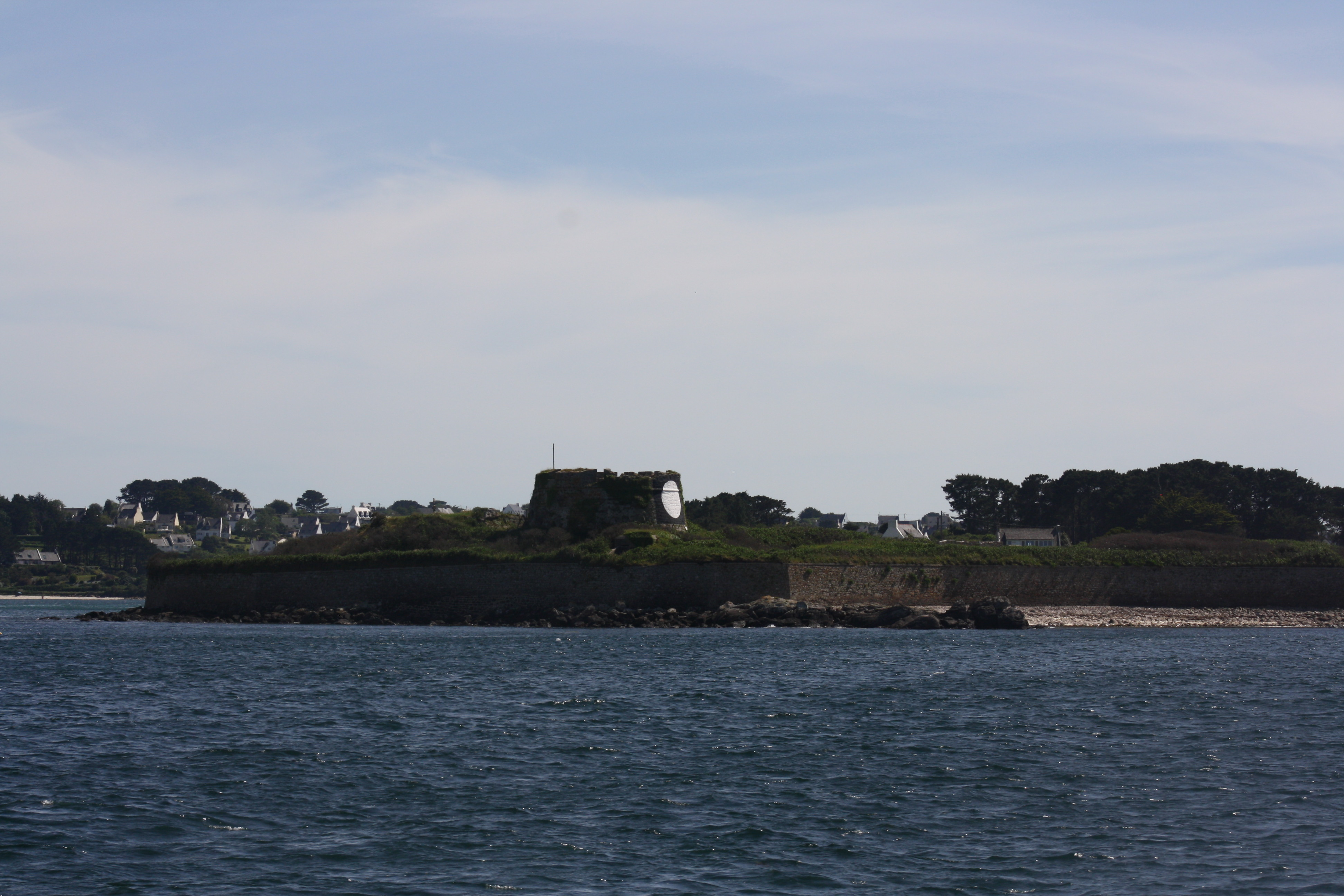 Blick auf das Fort Cézon von der Wasserseite aus